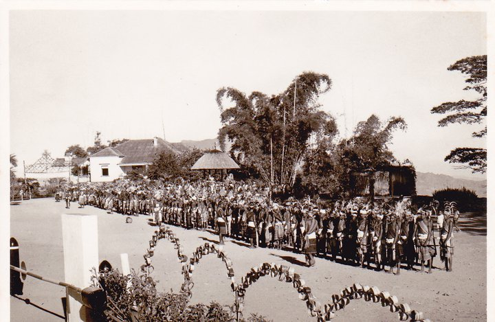 Uma companhia de moradores